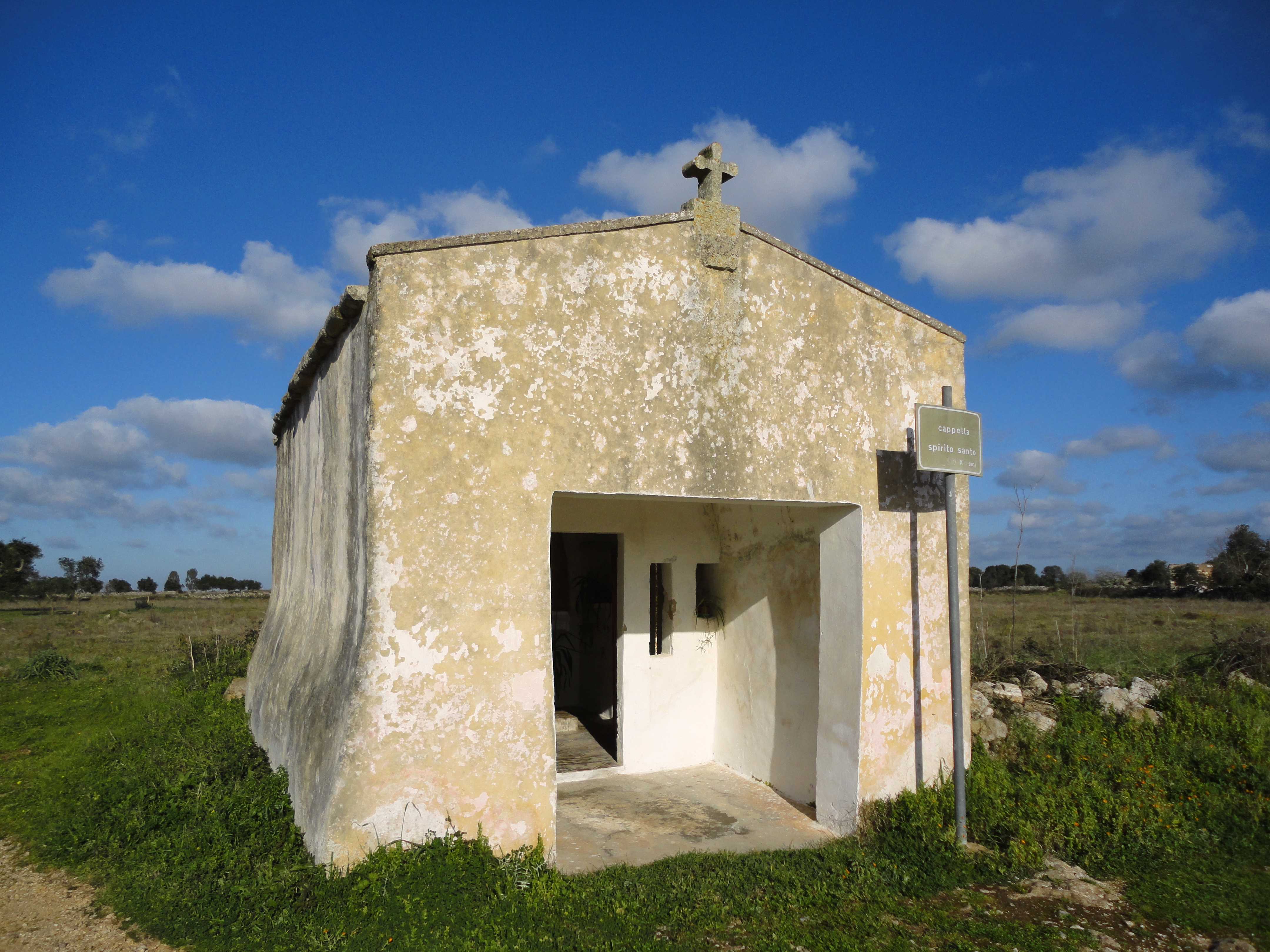 Cappella dello Spirito Santo Sternatia, Lecce